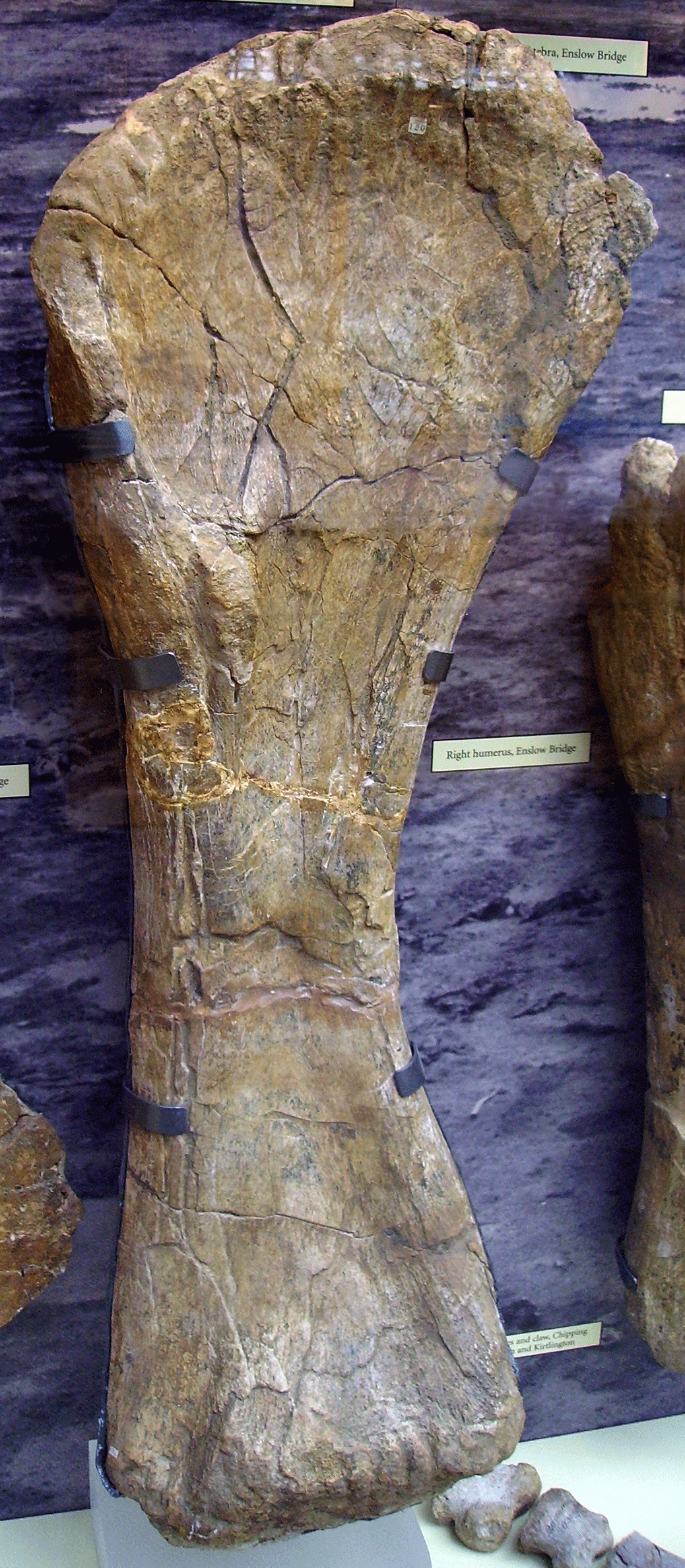 Cetiosaurus right humerus